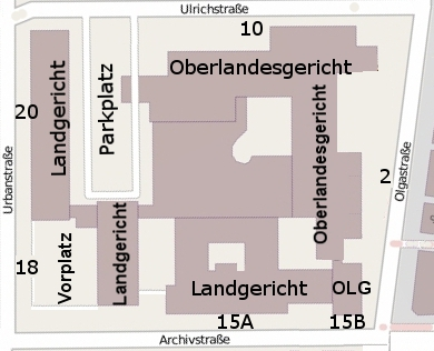 Justizviertel Stuttgart, 2016, Grundrissplan.